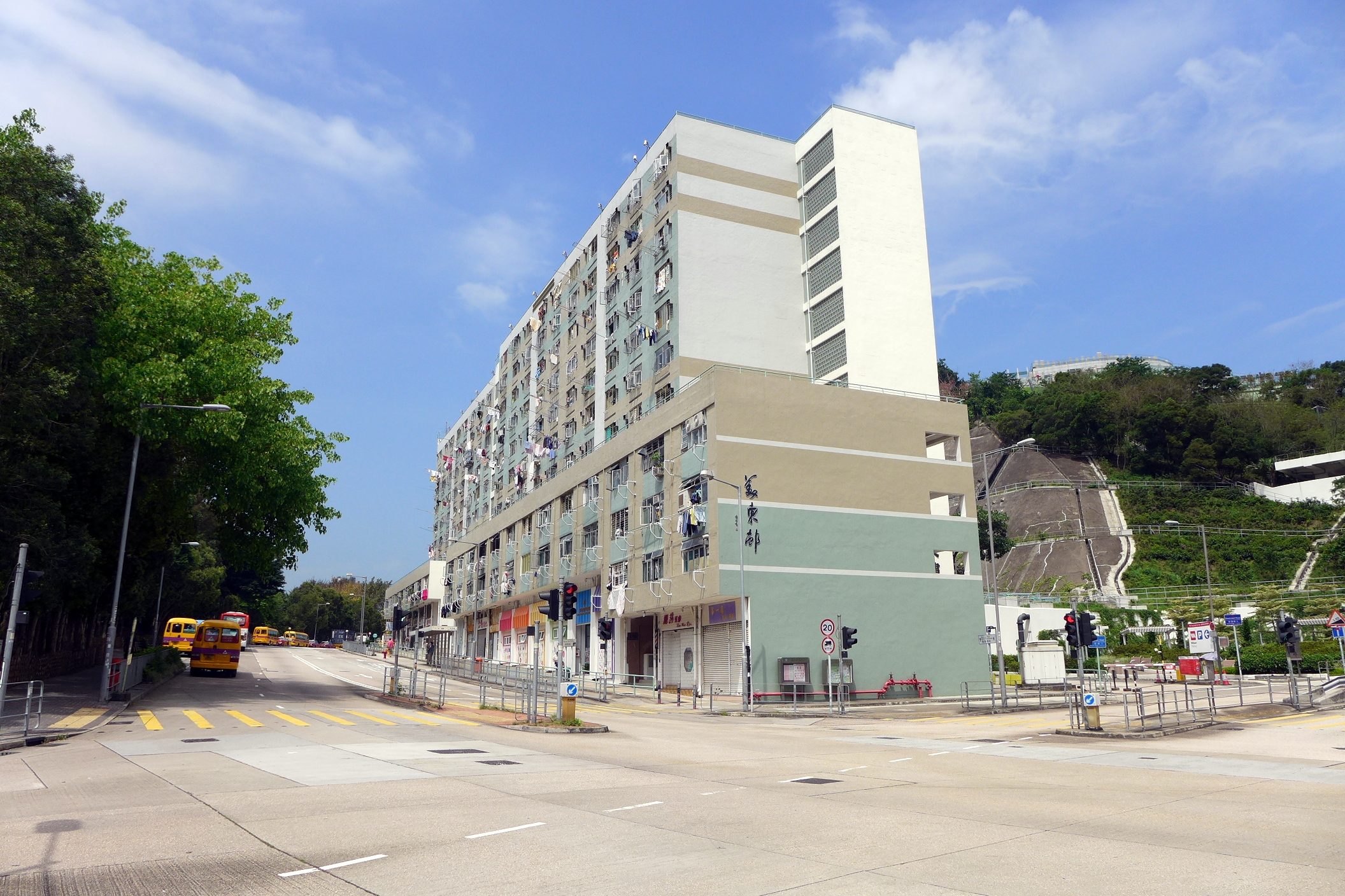 Mei Tung House, Mei Tung Estate